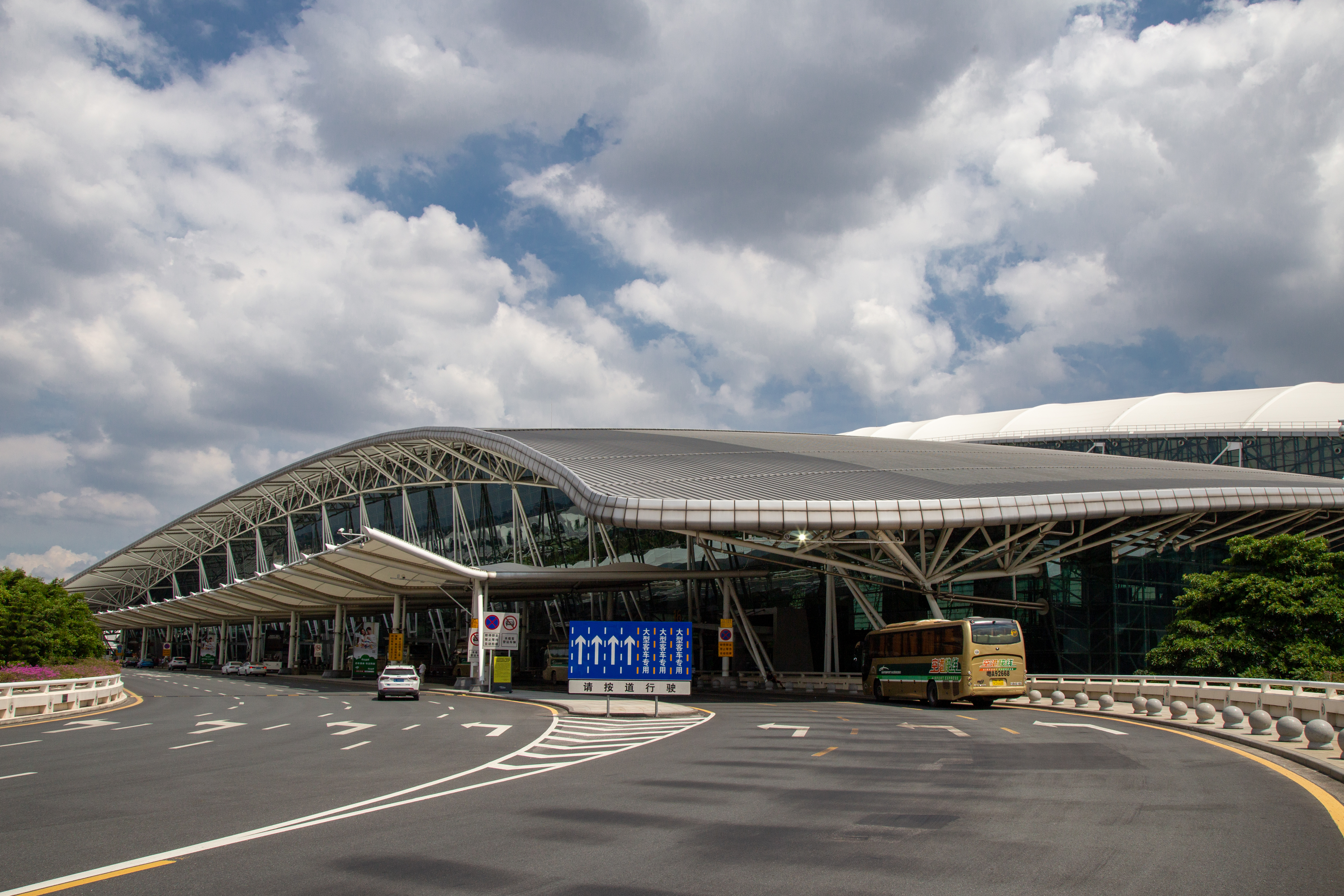 广州白云国际机场一号航站楼入口